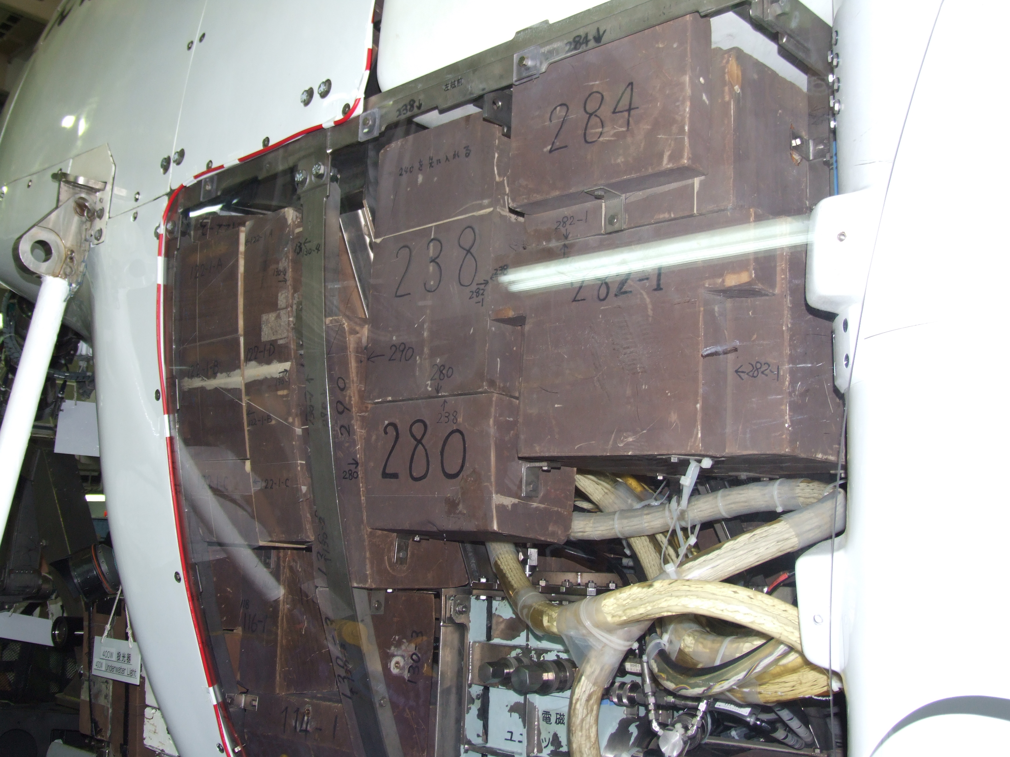 しんかい6500の浮力材（横浜港開港150年での母船よこすかの船内開放での撮影）